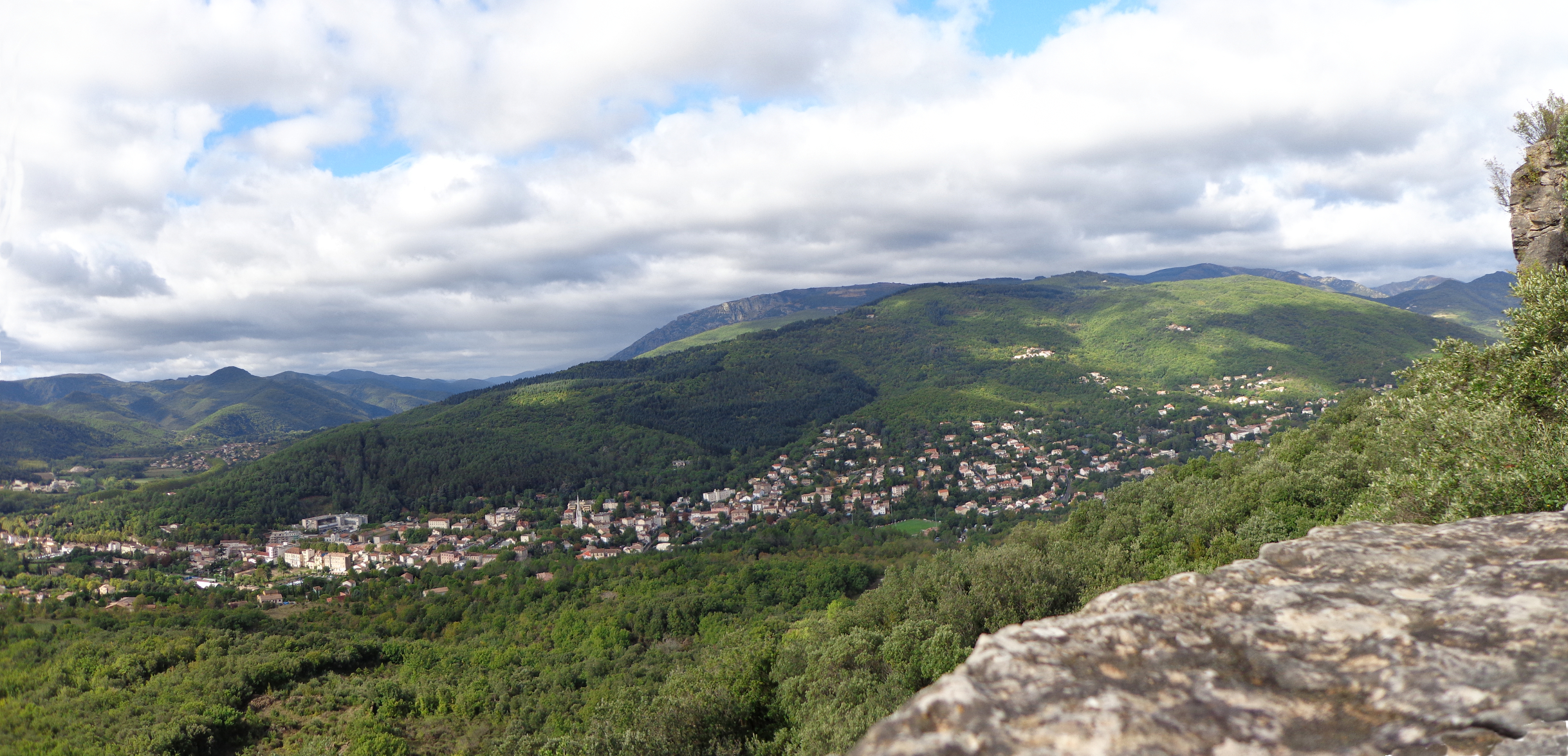 Lamalou-les-Bains (Hérault) - panorama sur Lamalou, le Poujol, Combes pris depuis la Chapelle ND de Capimont. On aperçoit Saint-Vital, le Fraisse, Villecelle. À l'arrière-plan, les monts de l'Espinouse.